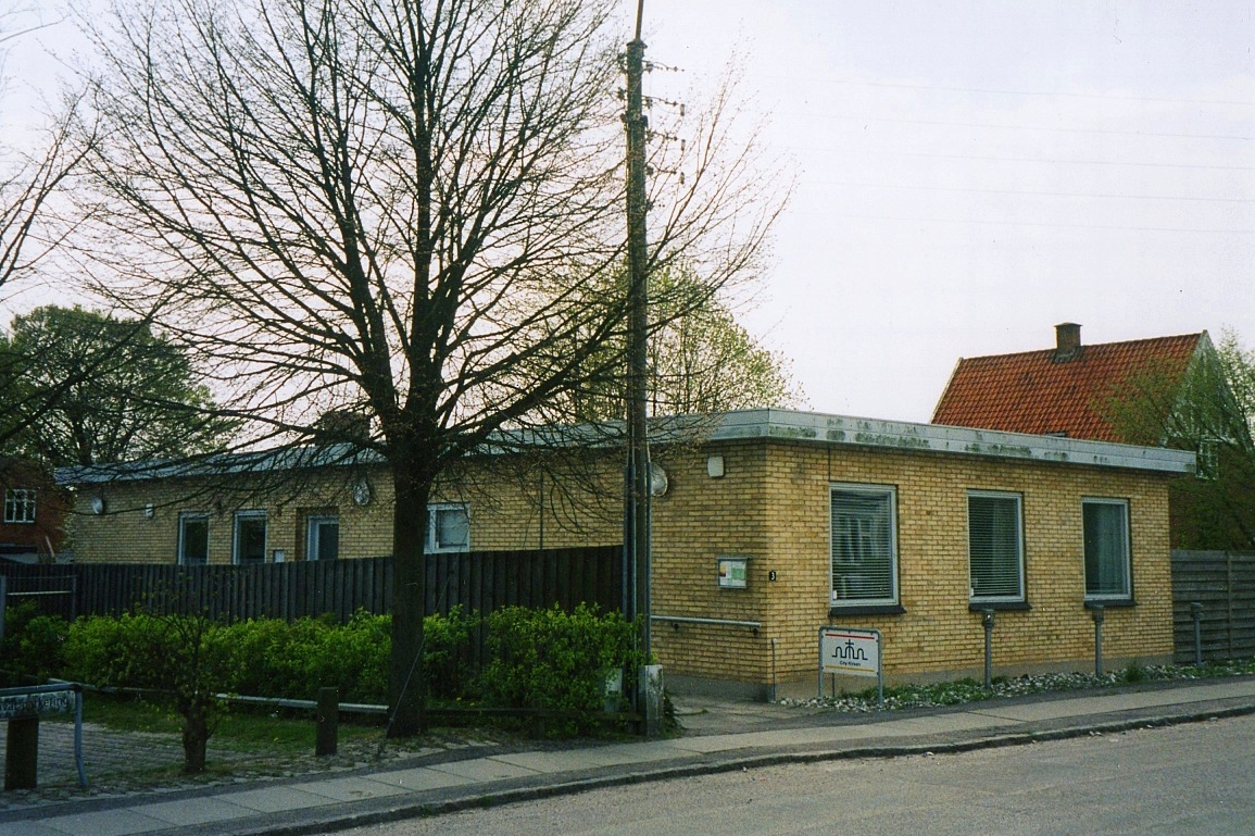 City Kirken (baptistkirke), Høje-Taastrup Kommune